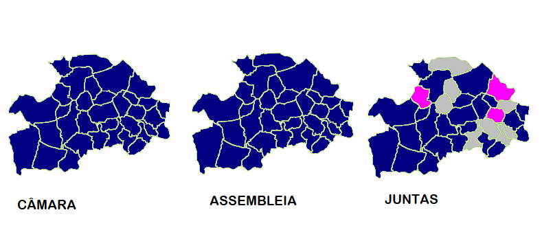 Mapa ilustrativo do partido mais votado por freguesia em Vila Nova de Famalicão (2017)